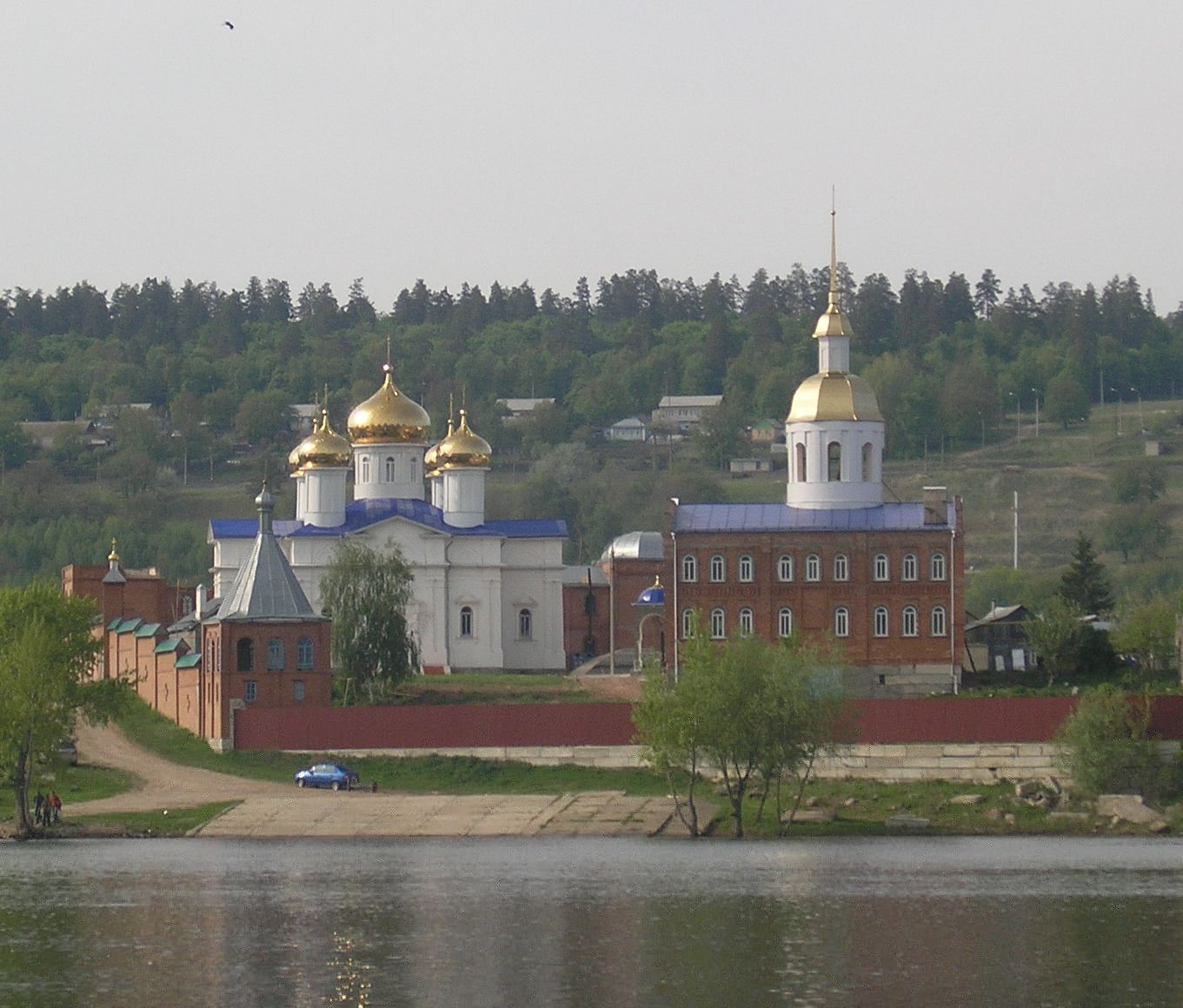 Благовещенский скит, Фёдоровка,Тольятти, Россия. Вид с полуострова Копылова